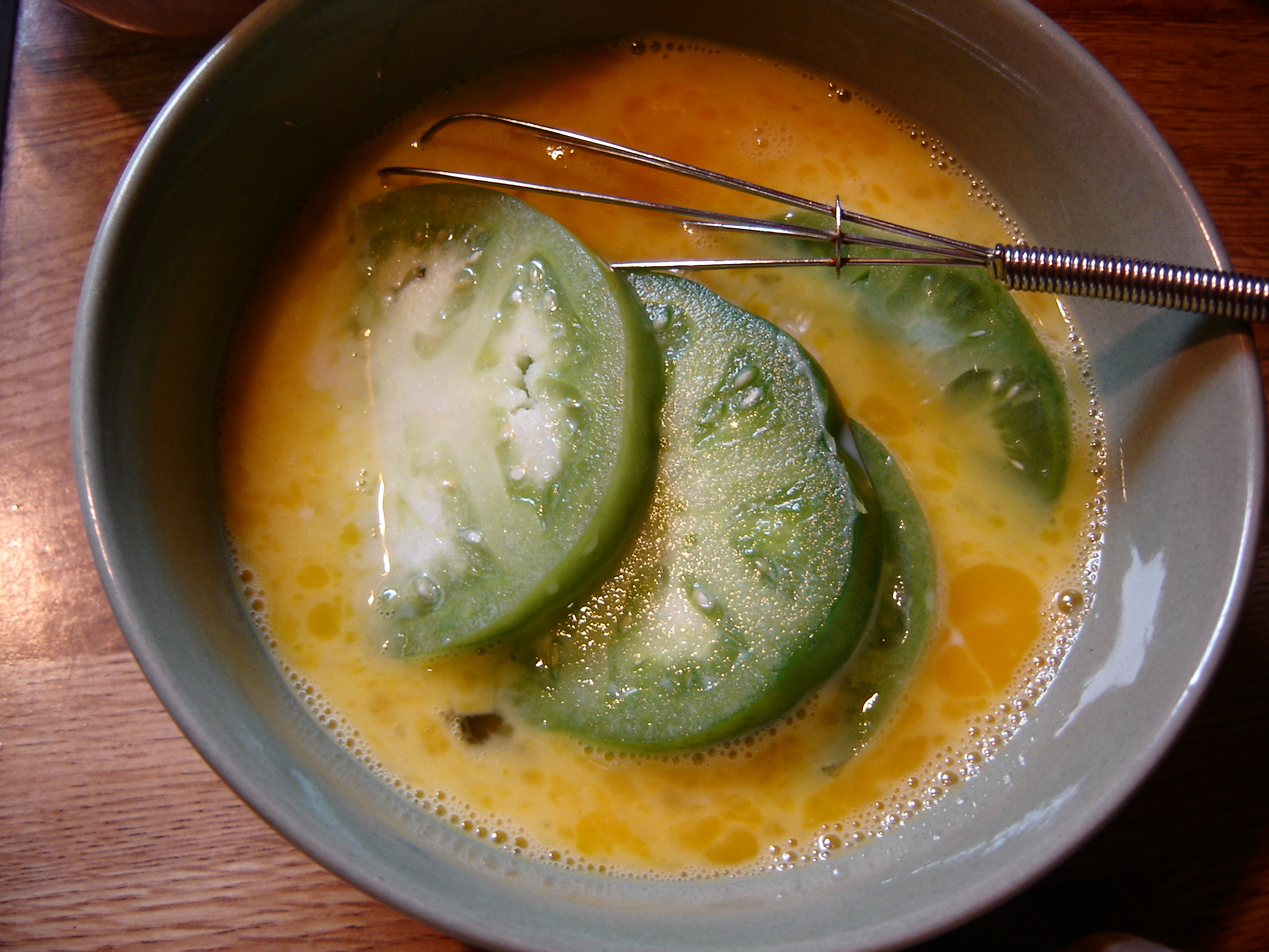 Green tomatoes in an egg wash